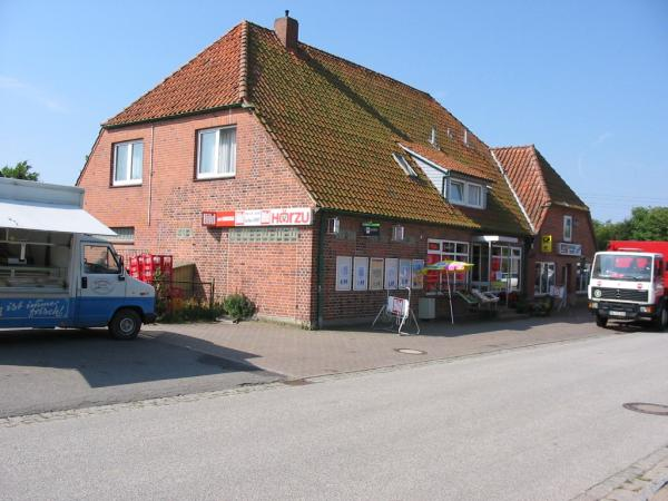 Das Kommunikationszentrum in Damlos, Kaufhaus Gehrdt